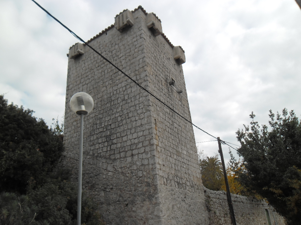 utvrda Toreta na Koločepu